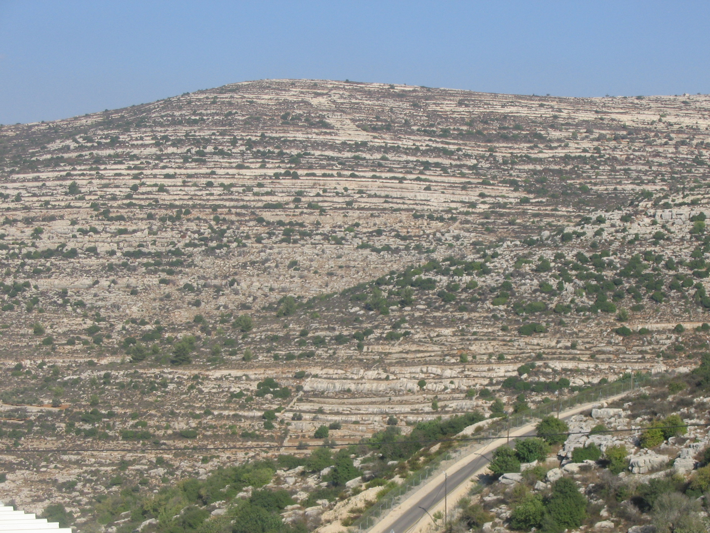 Вид из Атерет на окружающие горы